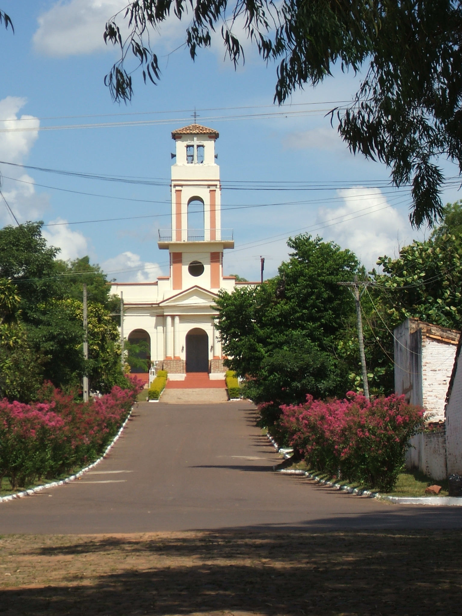 Iglesia de Atyra